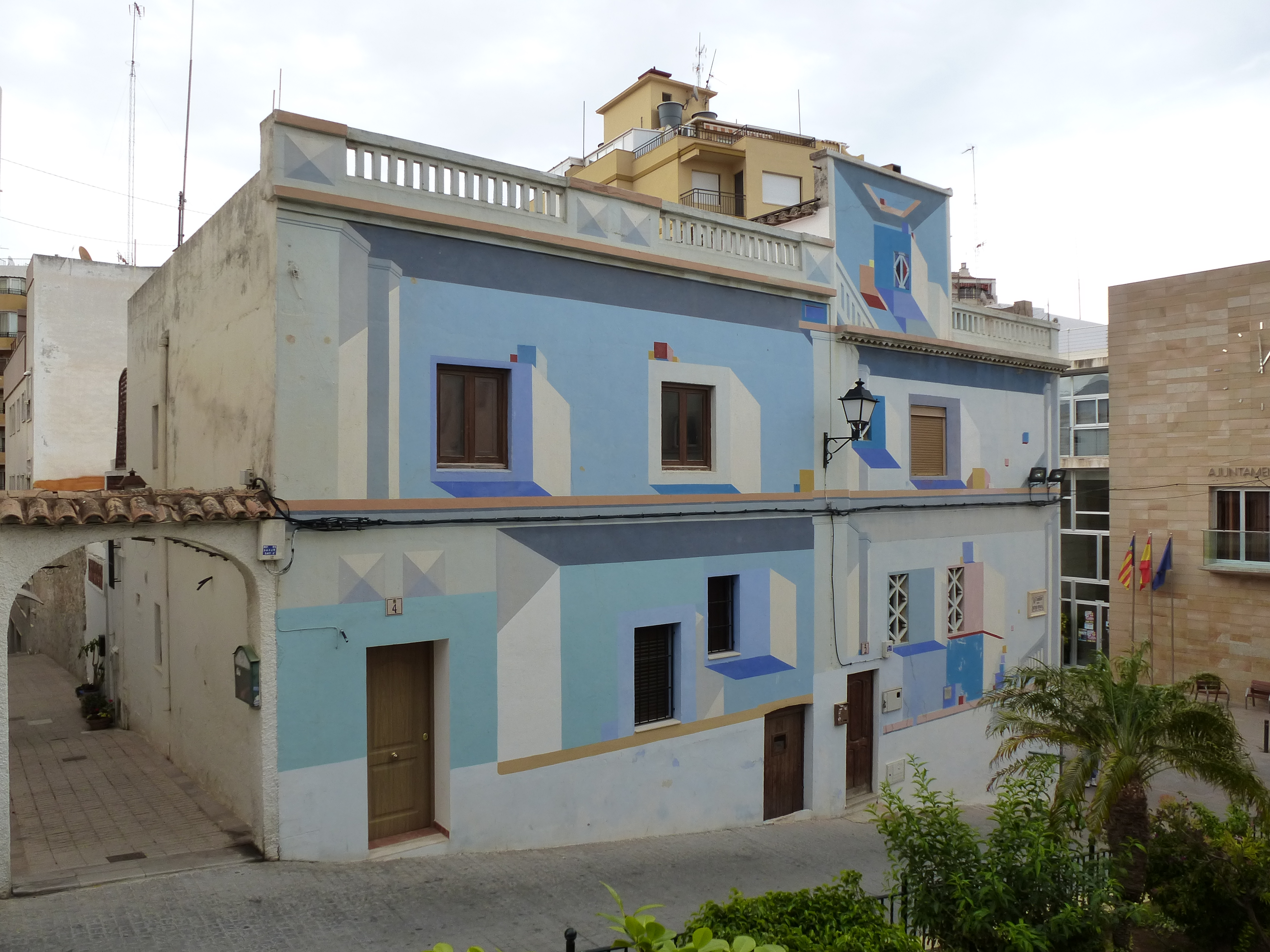 calpe